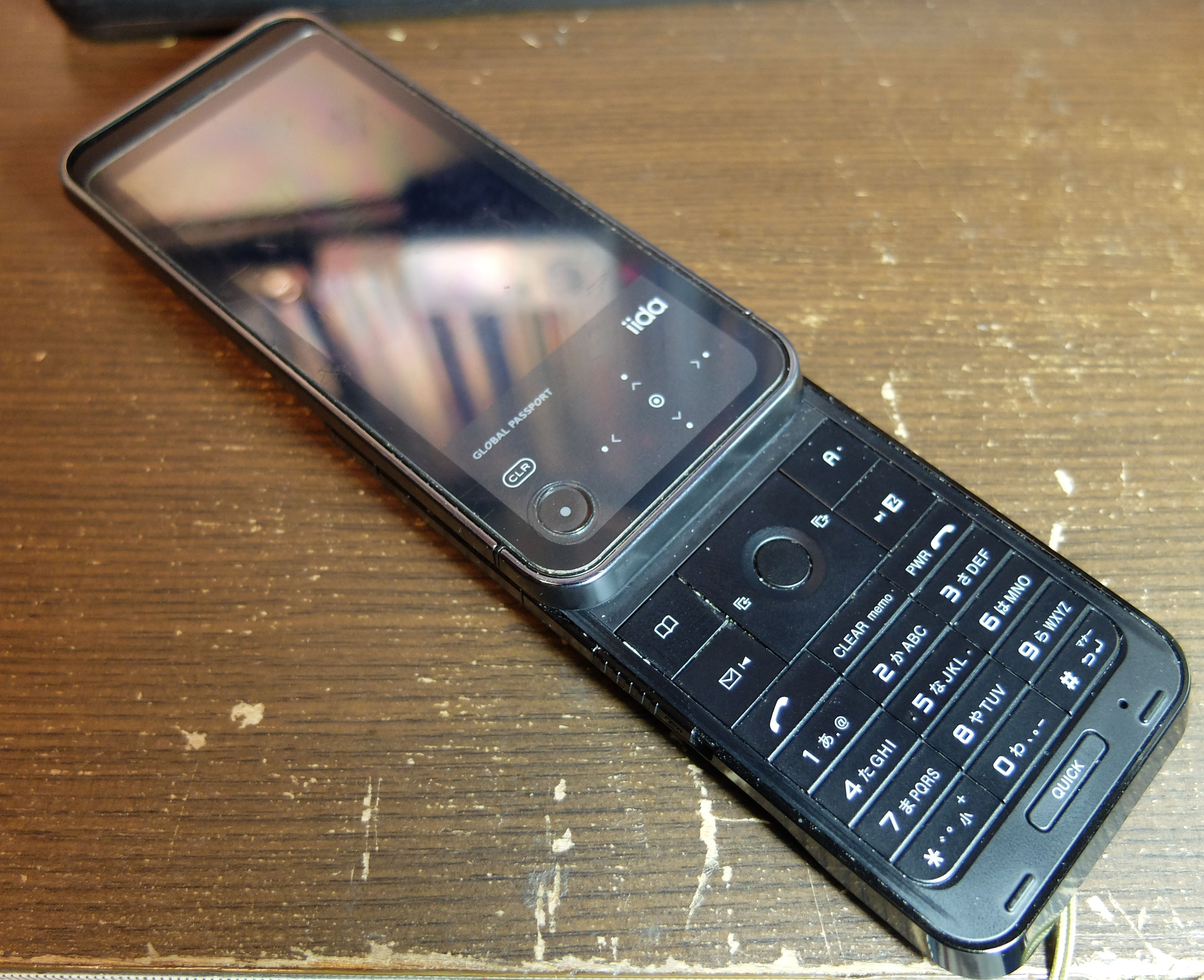 auのiidaG11の外観